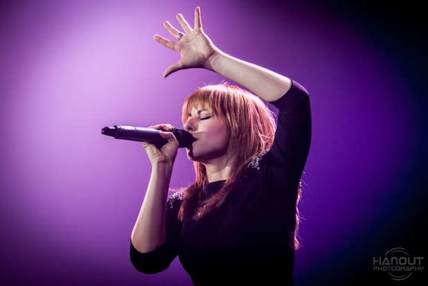 Cranberries 2012